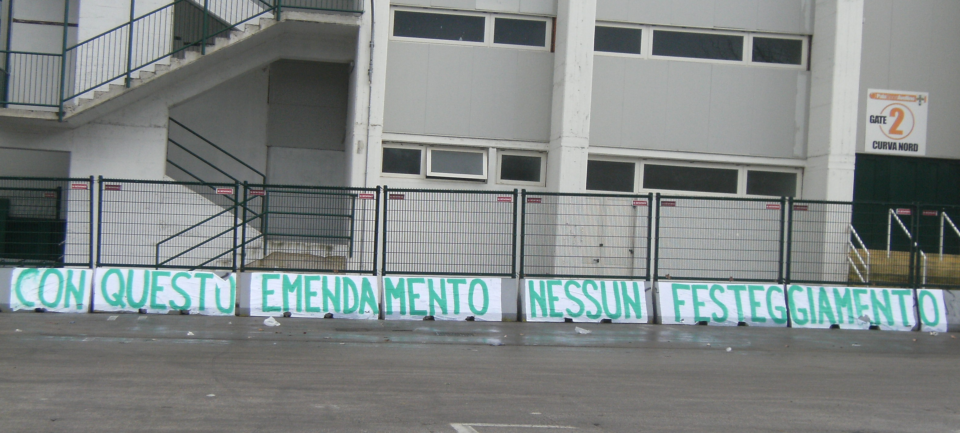 Striscione apposto sulla recinzione esterna del PalaDelMauro il 31/12/2011